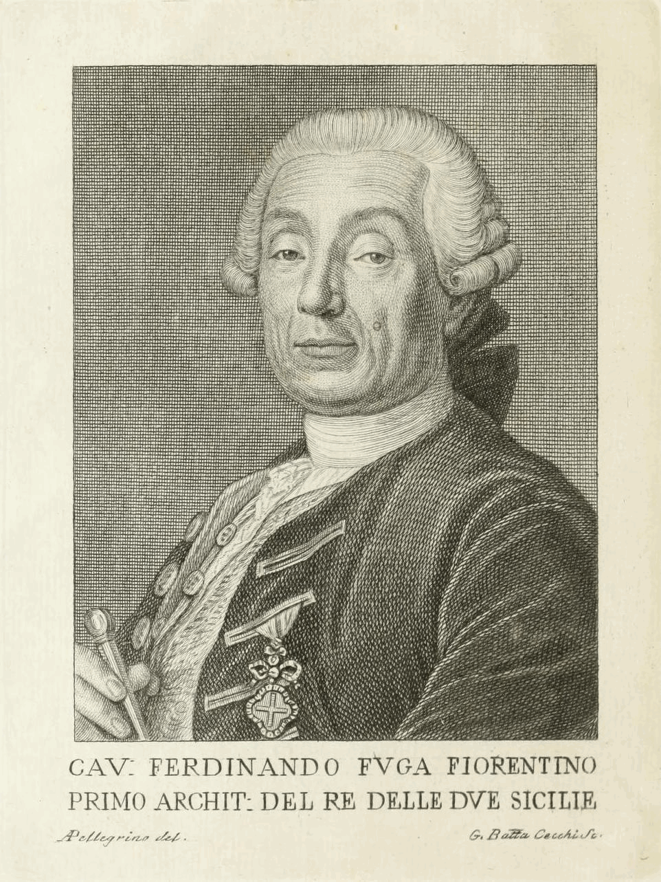 Ferdinando Fuga